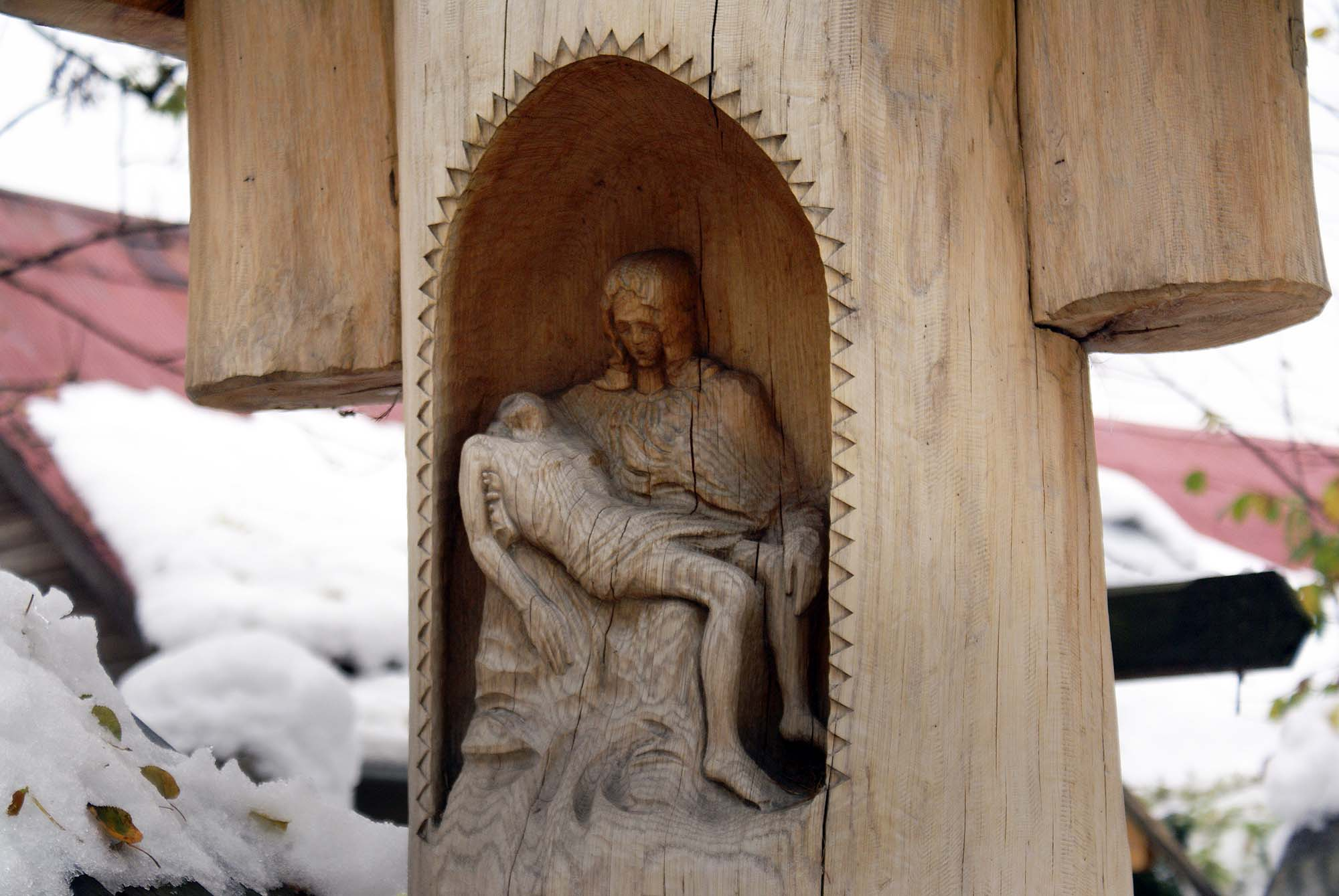 Zakopane, cmentarz "Na Pęksowym Brzyzku"